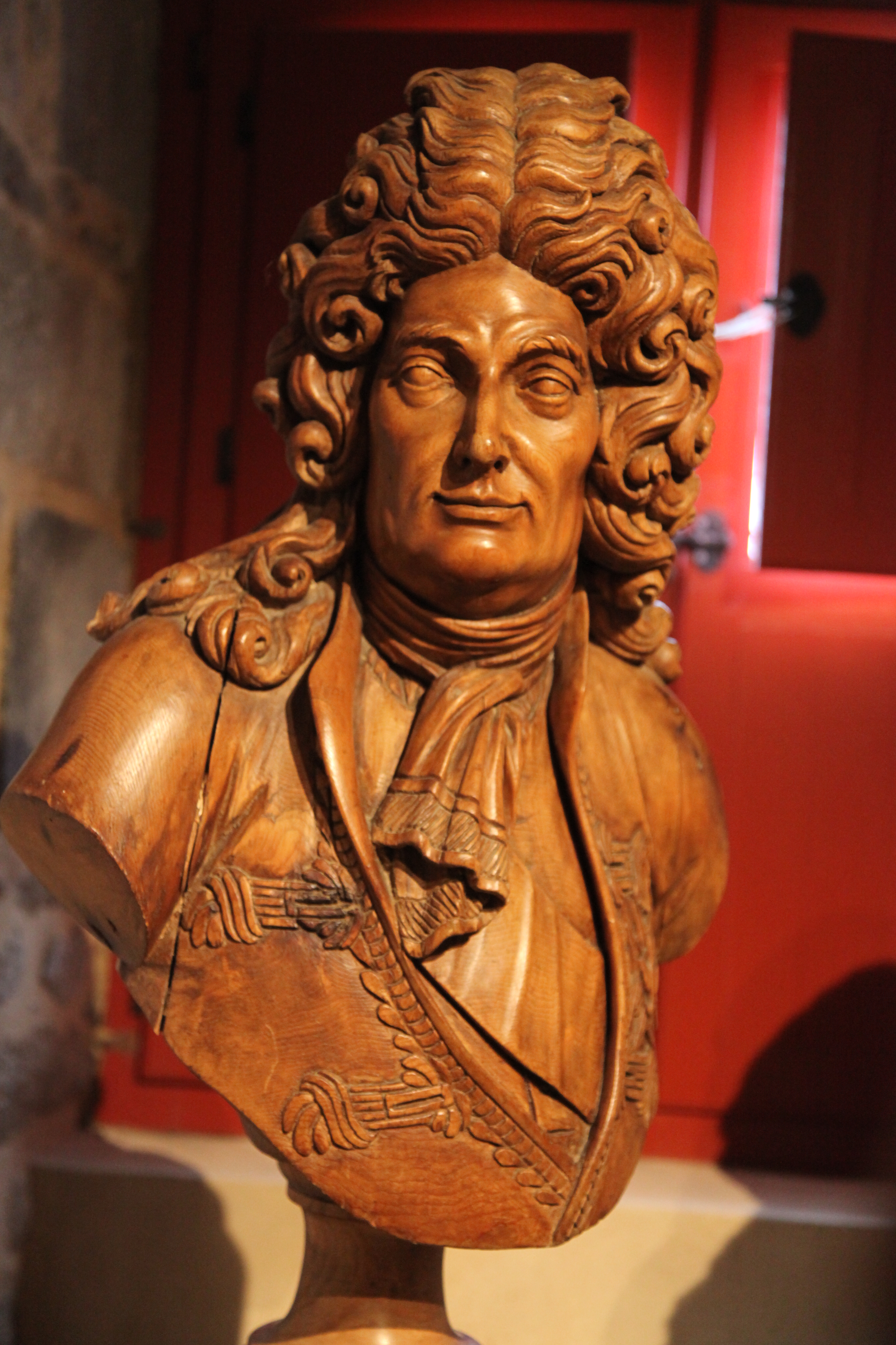 Blaise-Joseph Ollivier. (1701-1746). Ingénieur constructeur et directeur général des travaux du port de Brest. Buste en bois par le sculpteur Yves-Étienne Collet. Musée de la Marine de Brest.